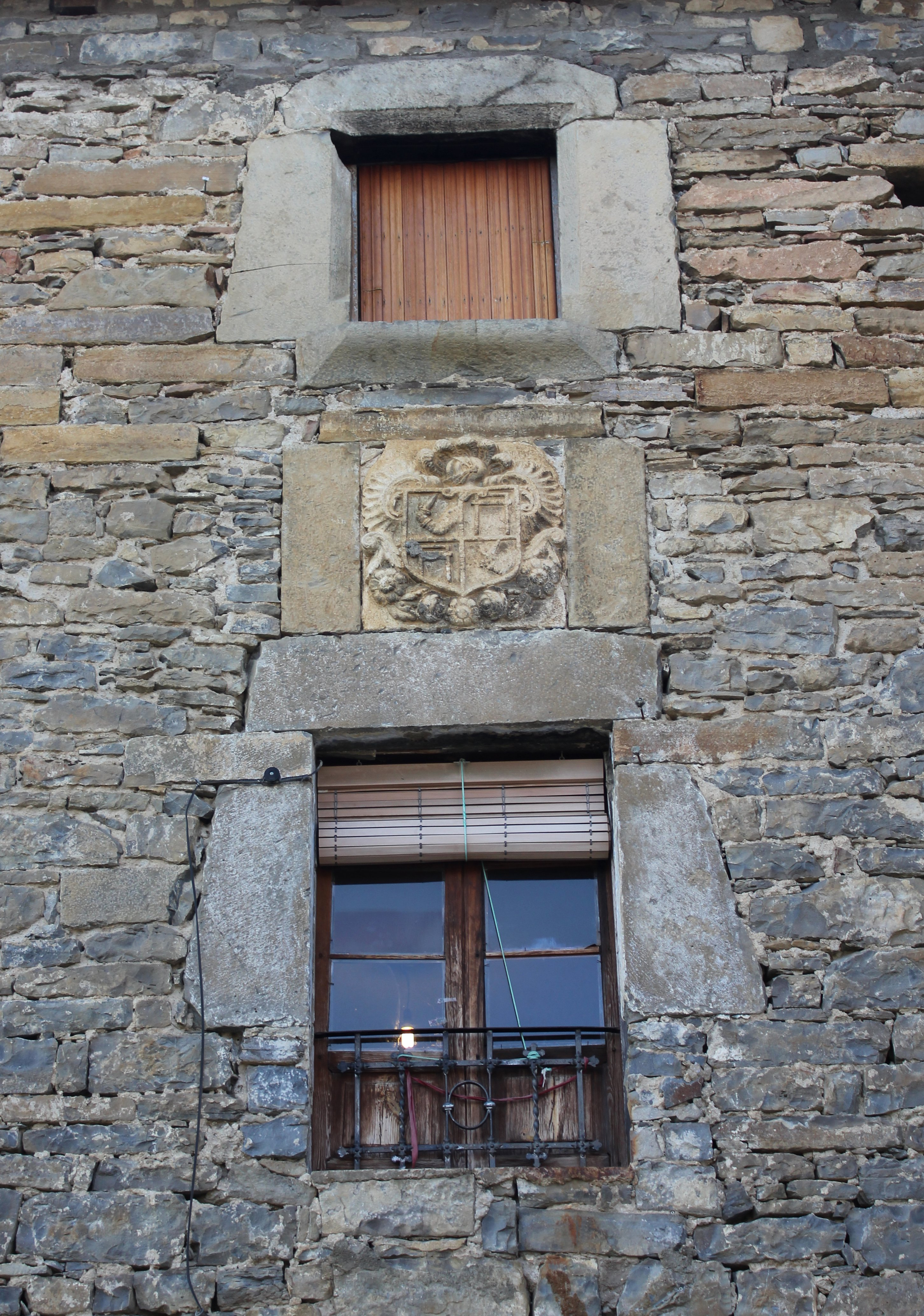 Aragonés: Cosculluela de Sobrarbe